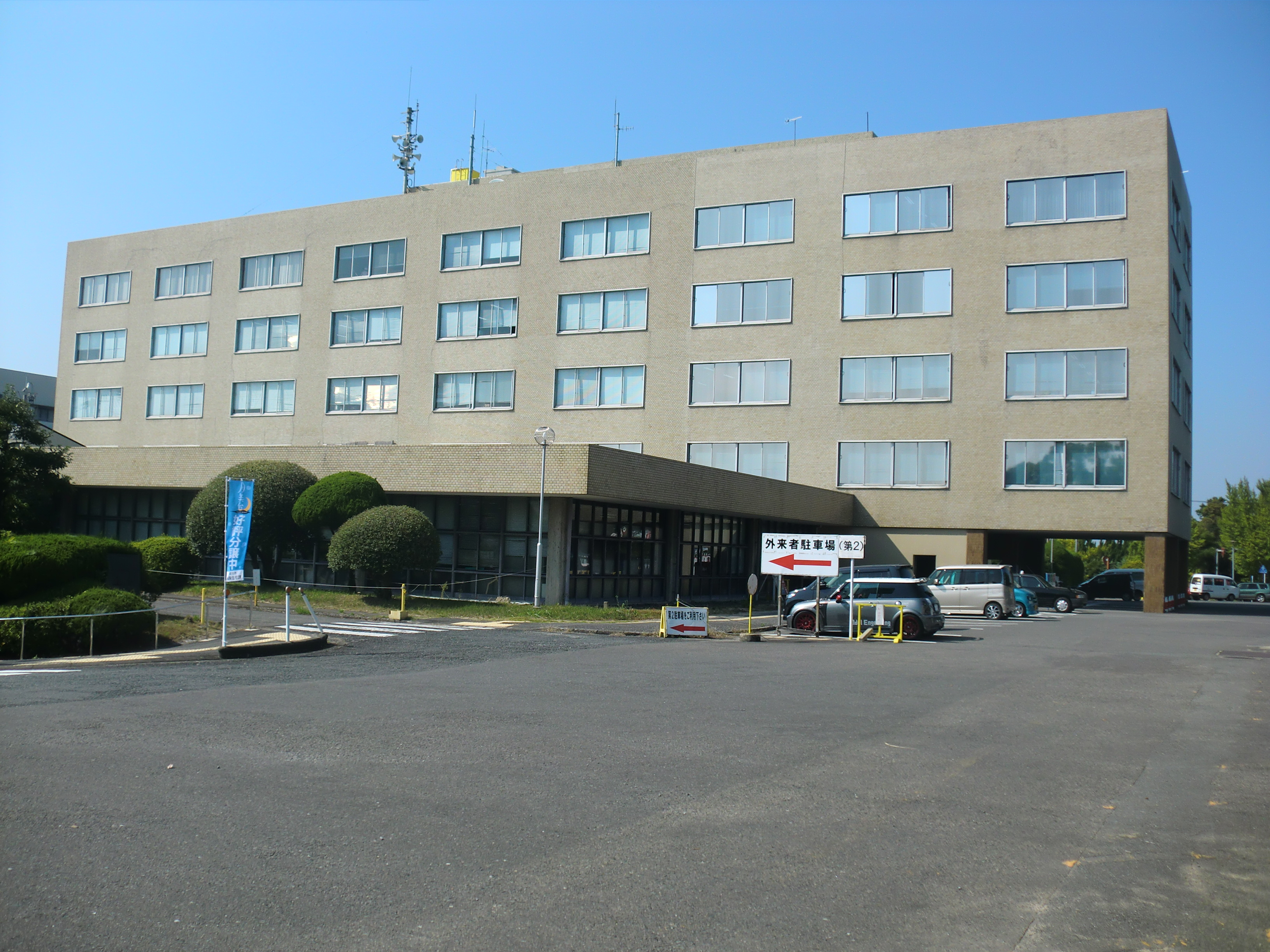 福岡県田川市にある田川市役所